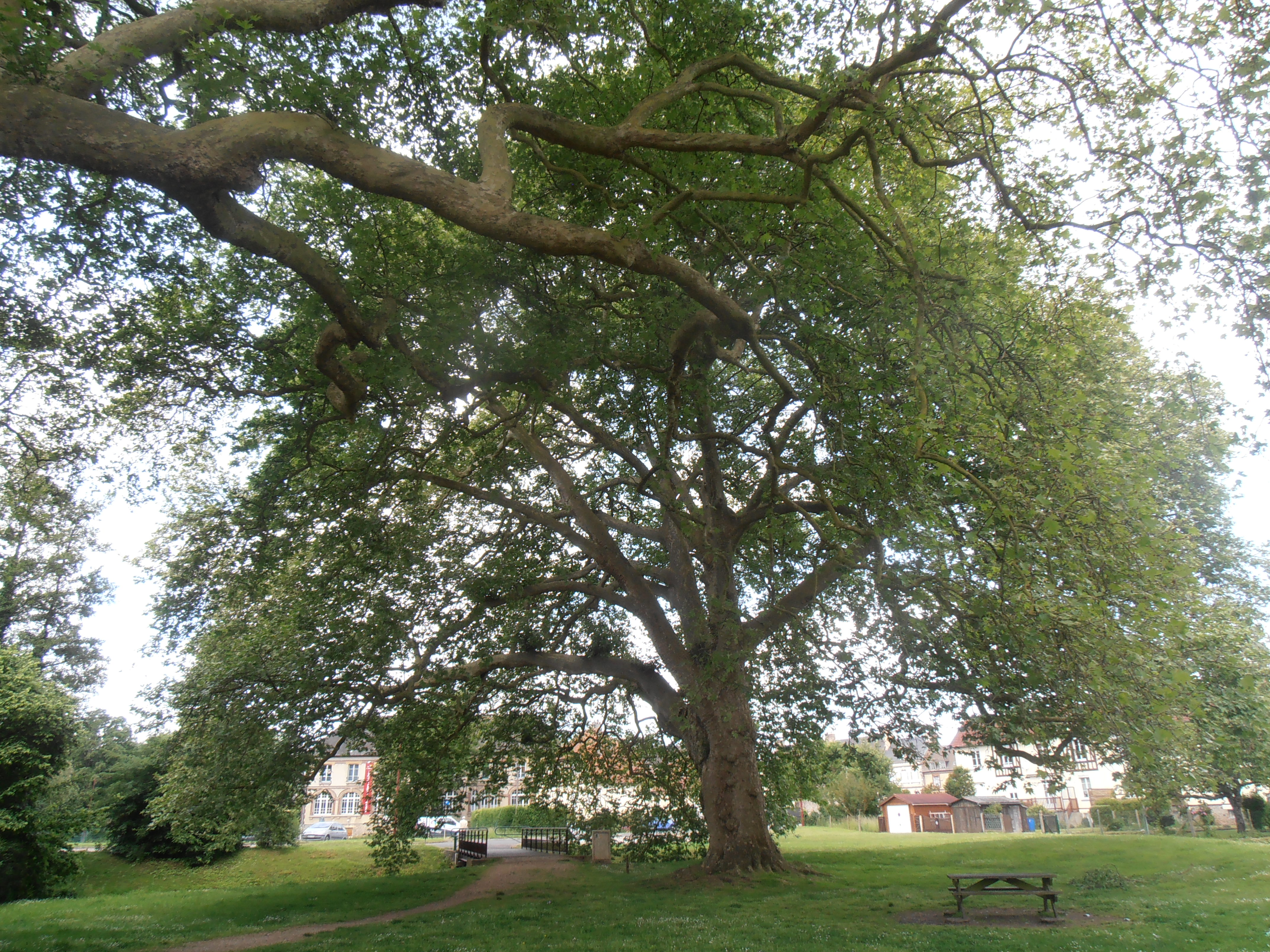 Orne, L'Aigle, Les deux platanes tricentenaires labellisés "Arbres remarquables de France". Platanus orientalis, famille des platanacées. Dimensions : hauteur 25 mètres; diamètre de la couronne 30 mètres; circonférence du tronc 7 mètres à 1,30 m du sol. Arbre de l'année le 11 octobre 2016. Pour les historiens locaux ces platanes faisaient partie des châteaux construits entre 1690 et 1730 sous les règnes de Louis XIV et de Louis XV. Ils prennent racine entre le deux bras de la Risle. Selon les botanistes ils peuvent devenir millénaires.